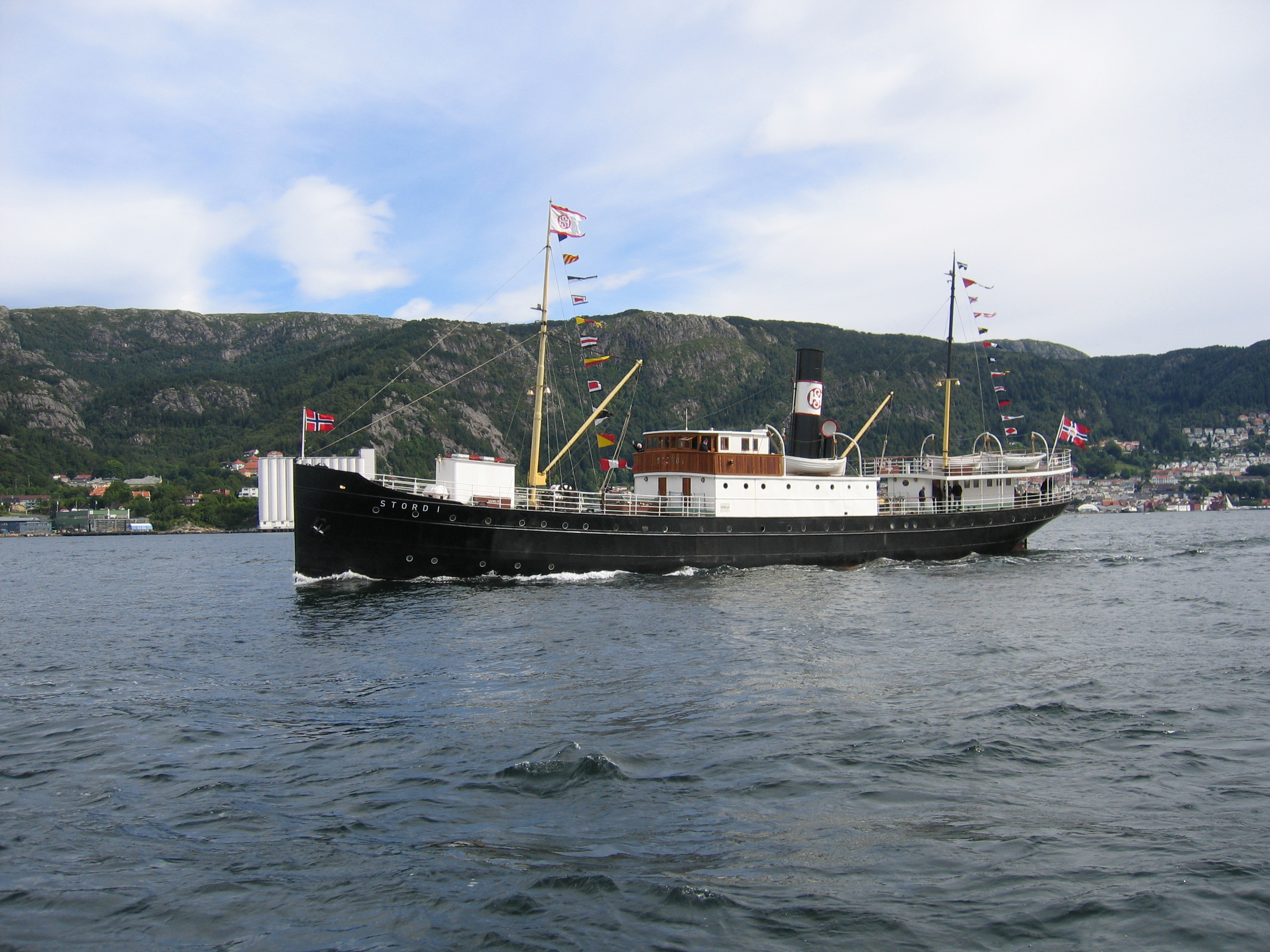 SS «Stord 1» in Bergen harbour, Norway August 2005.